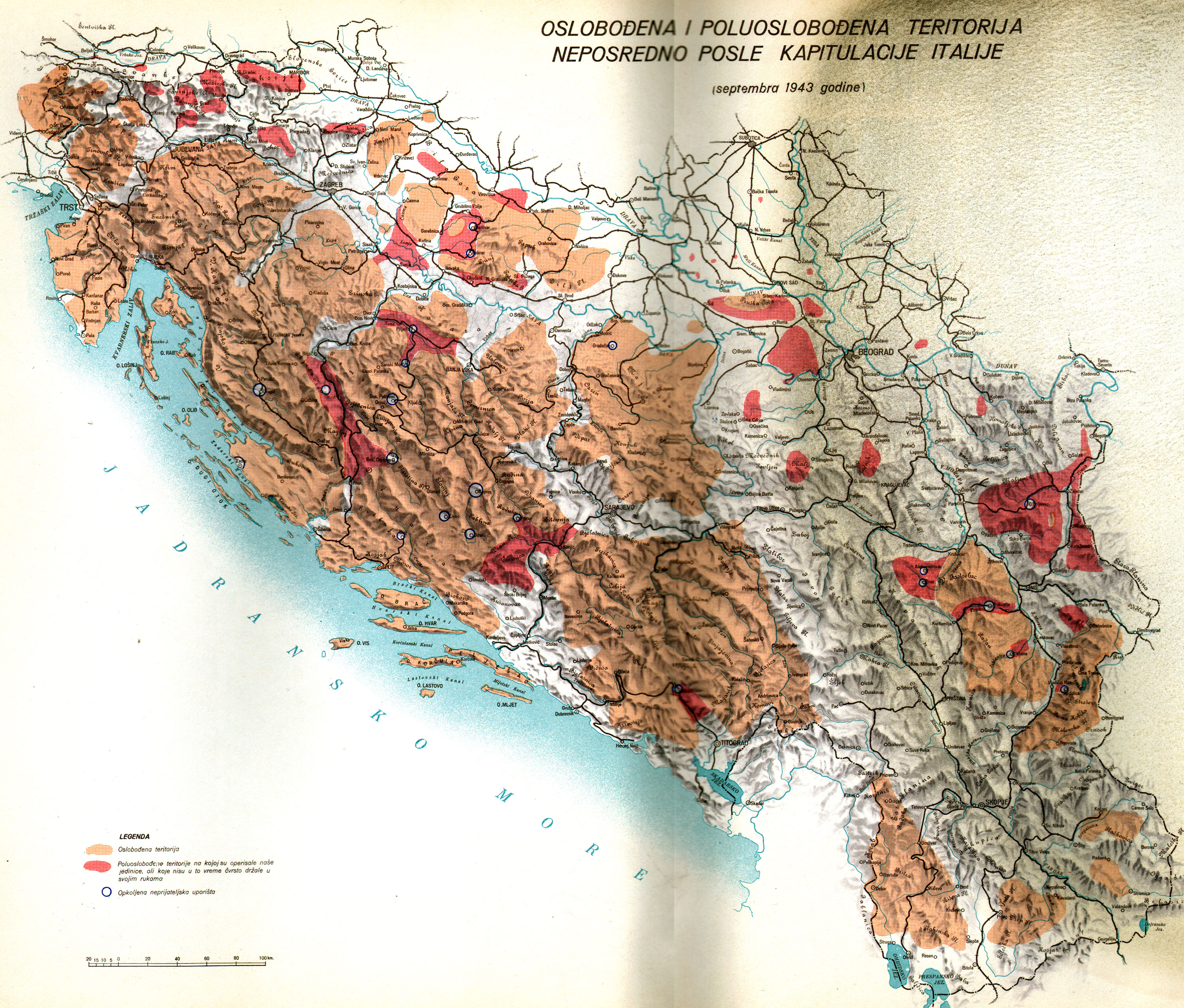 Srpskohrvatski / српскохрватски: Oslobođena i poluoslobođena teritorija neposredno posle kapitulacije Italije (septembra 1943 godine)